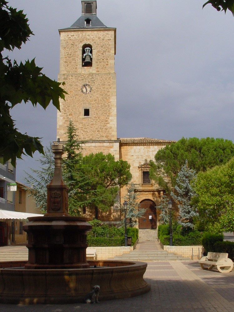 Iglesia de Quintanar del Rey, en Cuenca (España)